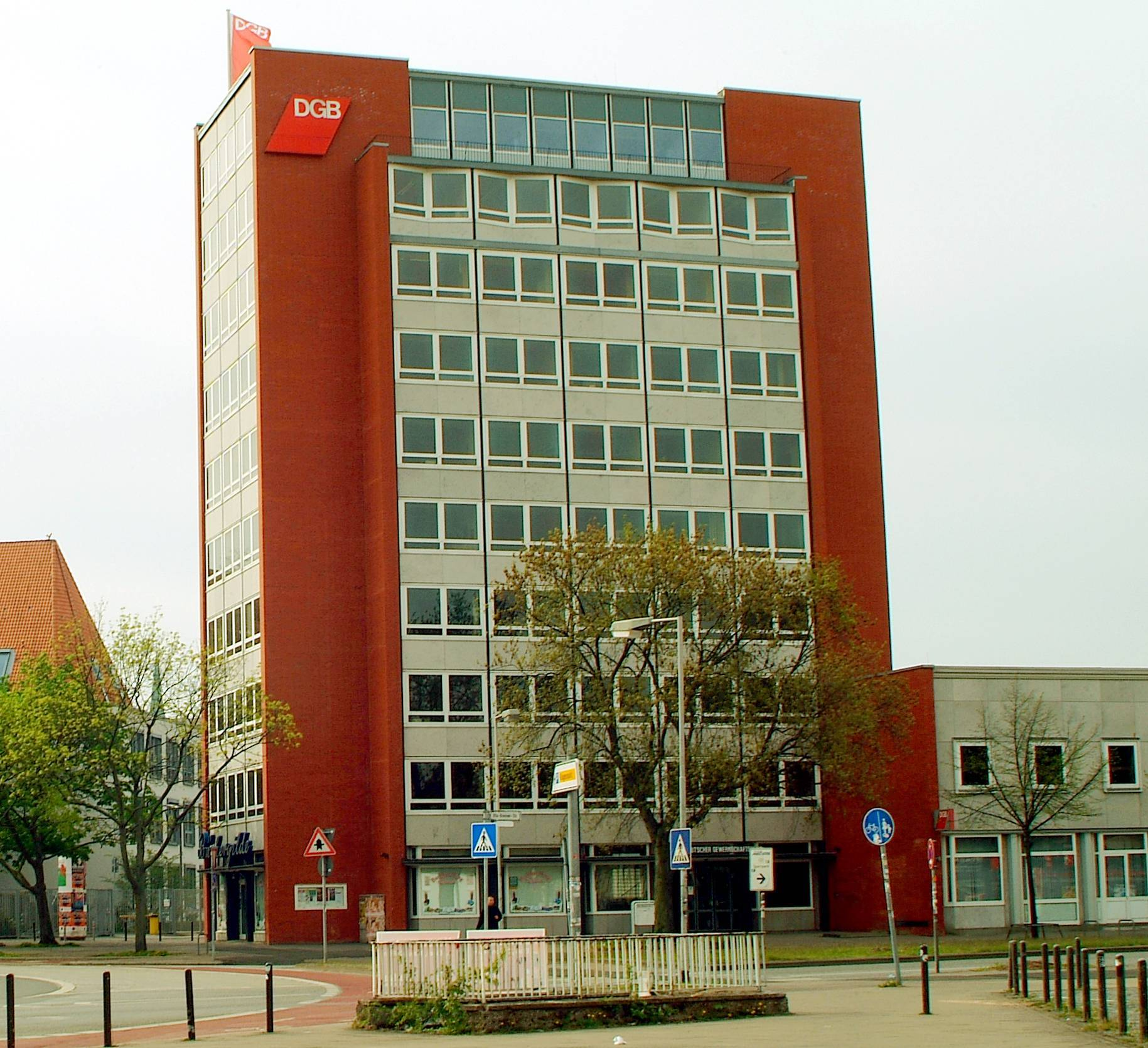 Das Gewerkschaftshaus des DGB in Hannover, Otto-Brenner-Straße 1; Blick vom Klagesmarkt über den Verkehrskreisel in Richtung Anzeiger Hochhaus